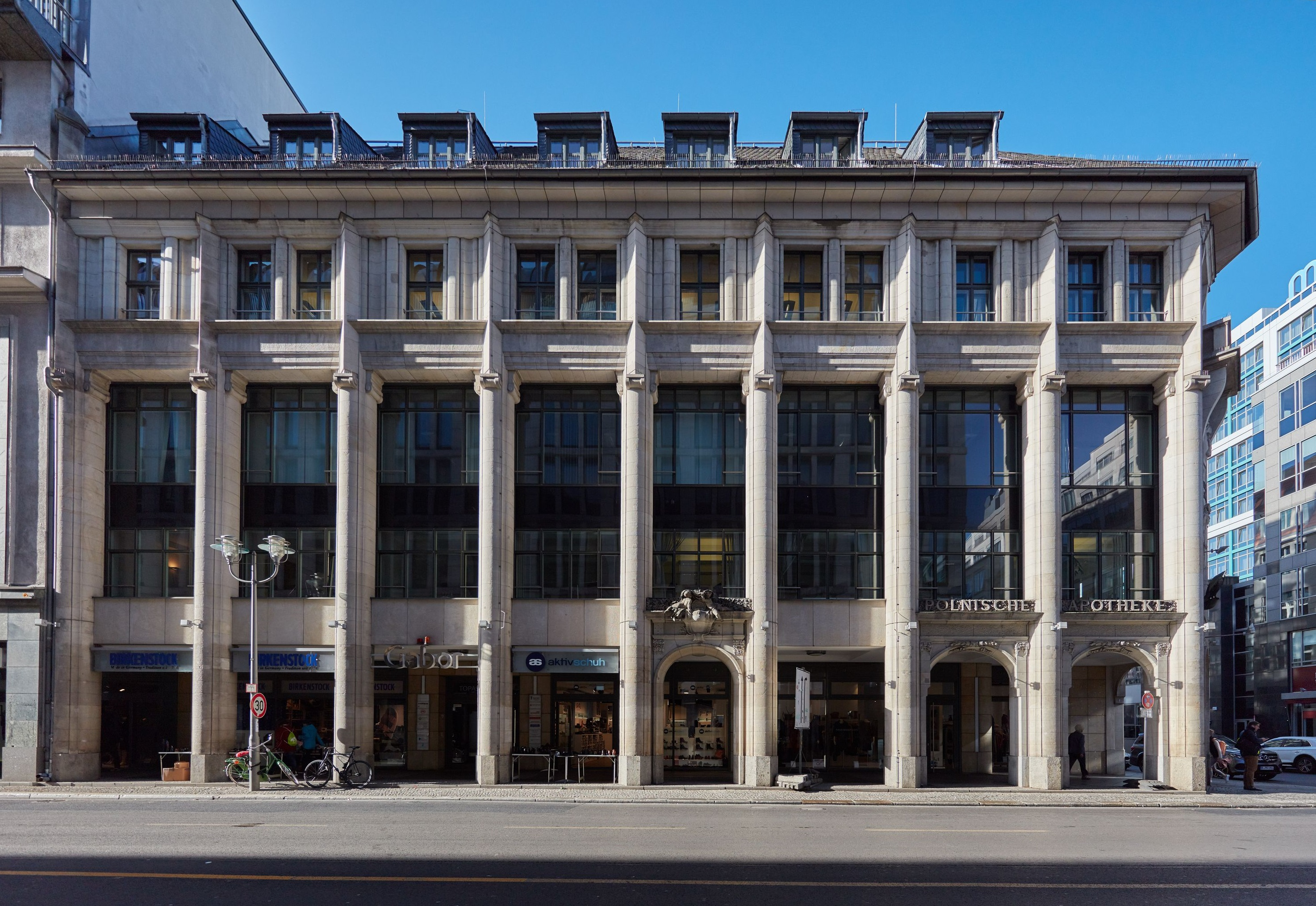 Suomen Saksan-instituutti Berliinissä